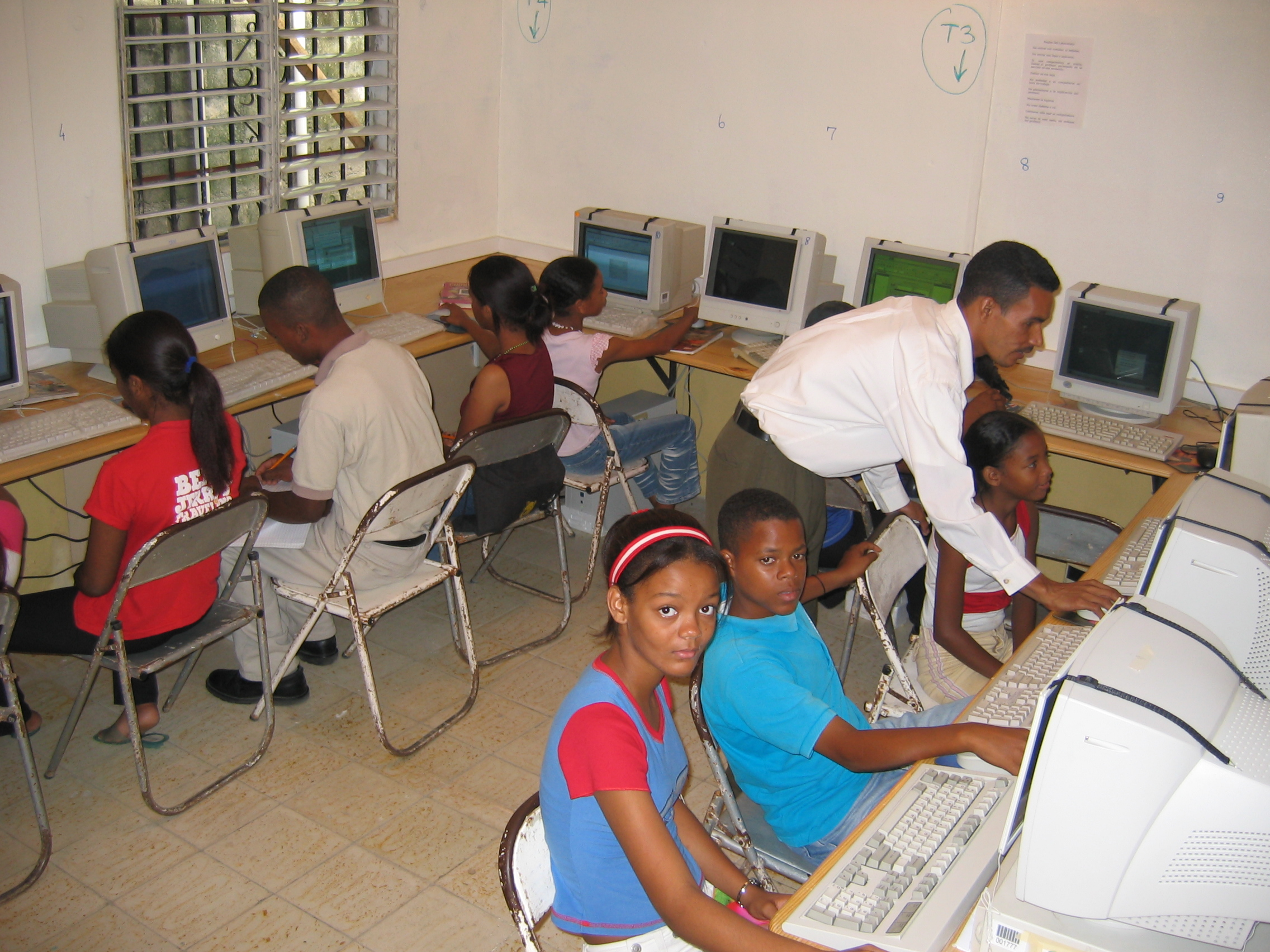 Missione genovese del Guaricano - Santo Domingo (Dominican Republic), bimbi a scuola - Foto di Donpaolo